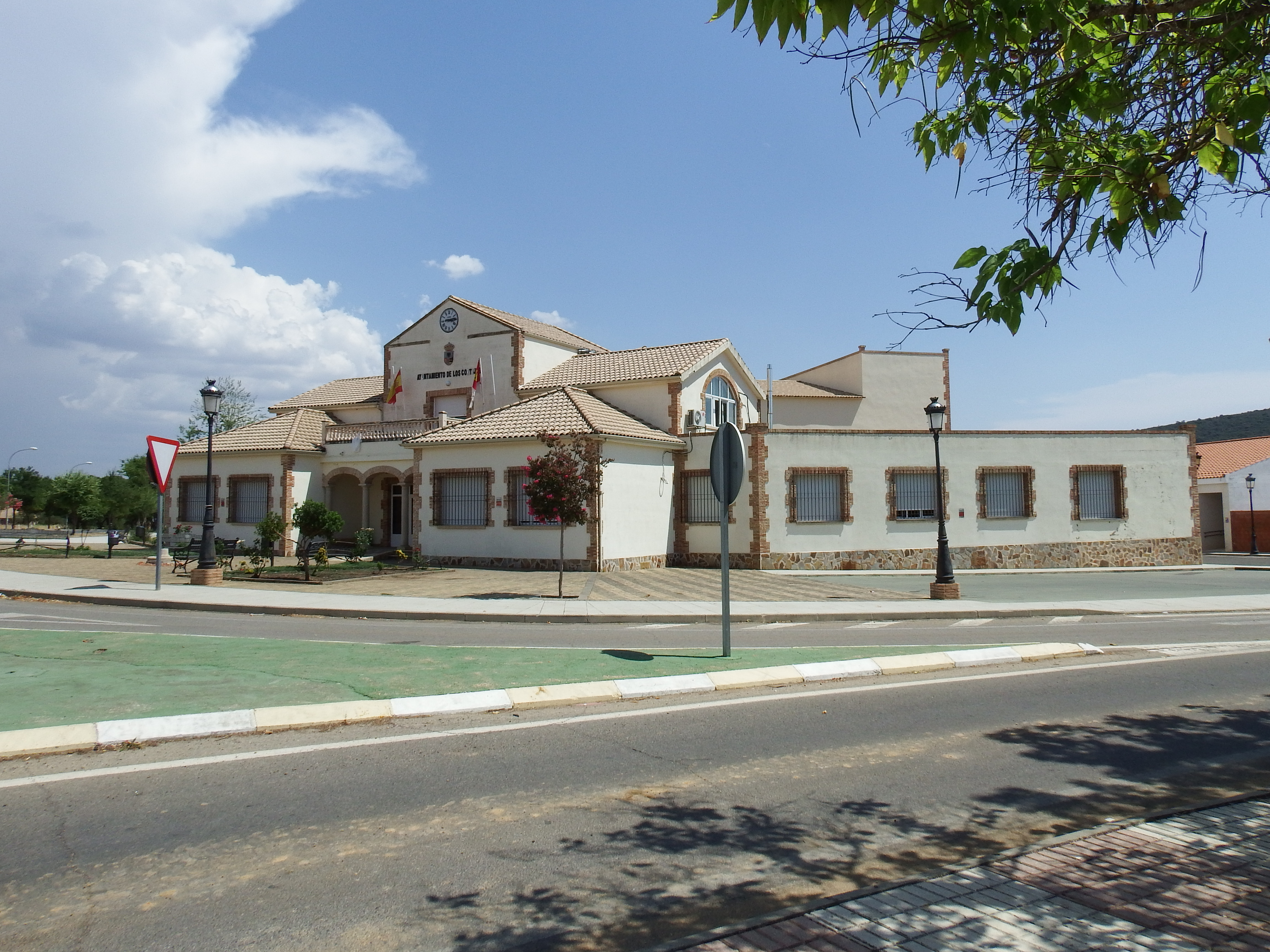 Los Cortijos, en la parte central entre los dos núcleos poblacionales.